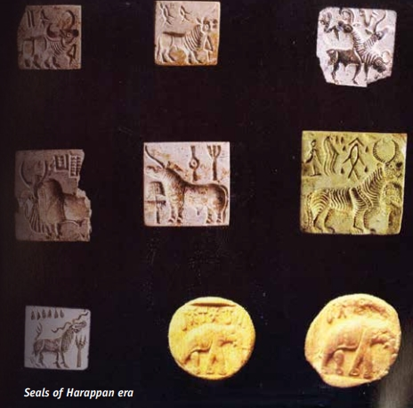 Индская цивилизация